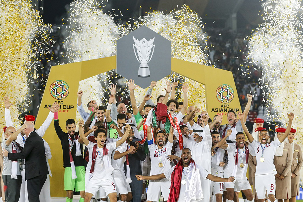 دیدار فینال جام ملت‌های 2019 آسیا بین تیم ملی فوتبال قطر و ژاپن بعدظهر جمعه 12 بهمن در ورزشگاه زاید به قضاوت روشن ایرماتوف ازبکستانی برگزار شد.المعزعلی در دقیقه 12 و عبدالعزیر حاتم 27 و اکرم عفیف در دقیقه 83 با ضربه پنالتی برای قطر گلزنی کردند.برای ژاپن مینامینو 69 موفق به گشودن دروازه قطر شدند.